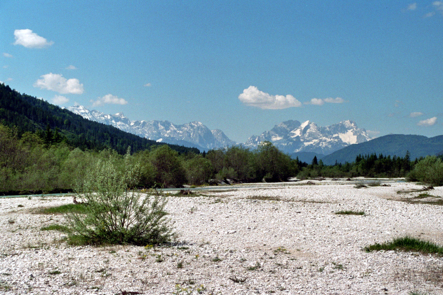 Im Isartal oberhalb von Vorderriß, Blick flussaufwärts